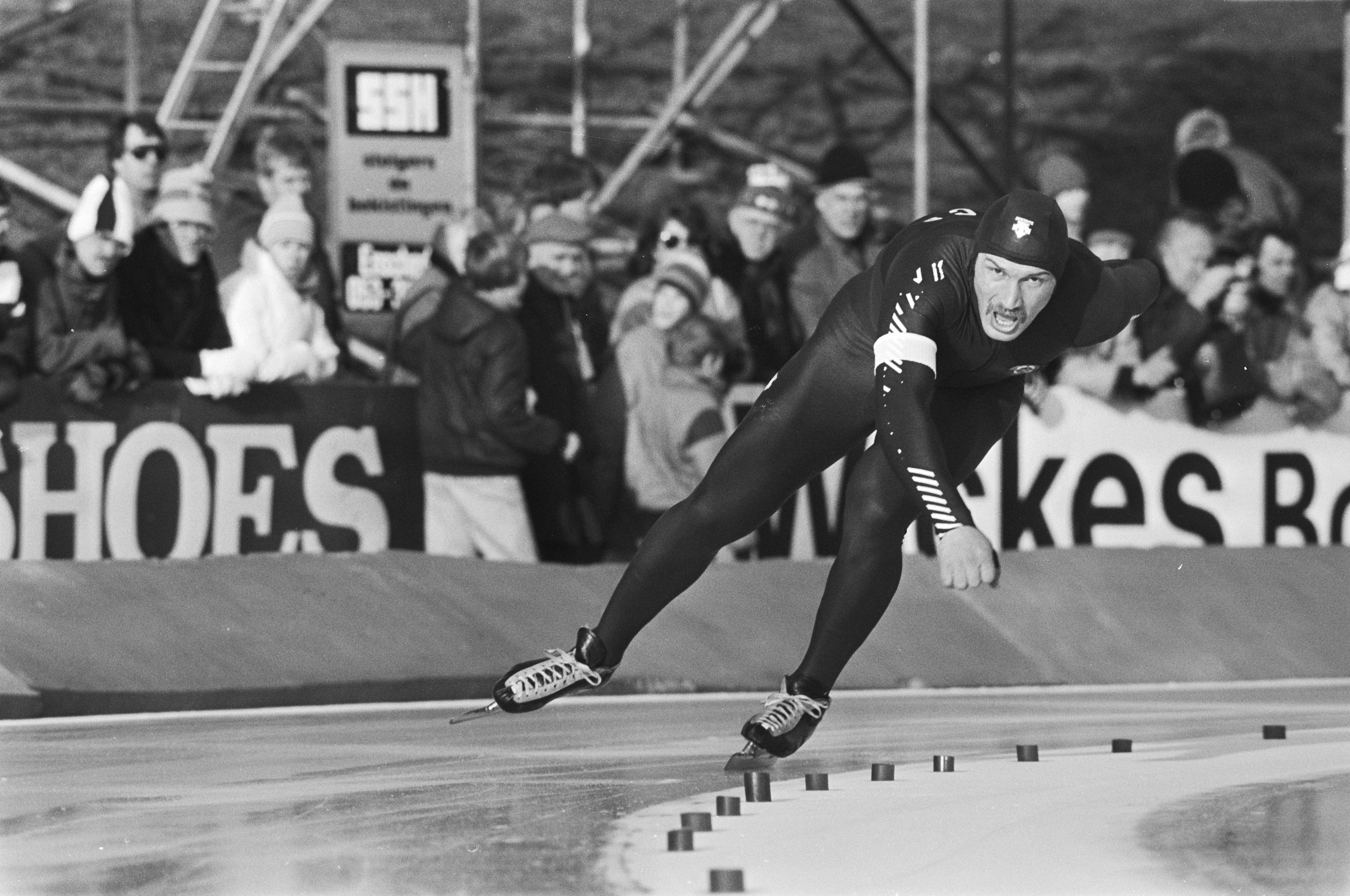 Collectie / Archief : Fotocollectie Anefo Reportage / Serie : [ onbekend ] Beschrijving : WK Sprint schaatsen in Alkmaar. De Rus Klebnikov in aktie Datum : 6 februari 1982 Locatie : Alkmaar, Noord-Holland Trefwoorden : schaatsen Persoonsnaam : Chlebnikov, Sergej Fotograaf : Bogaerts, Rob / Anefo Auteursrechthebbende : Nationaal Archief Materiaalsoort : Negatief (zwart/wit) Nummer archiefinventaris : bekijk toegang 2.24.01.05 Bestanddeelnummer : 931-9572